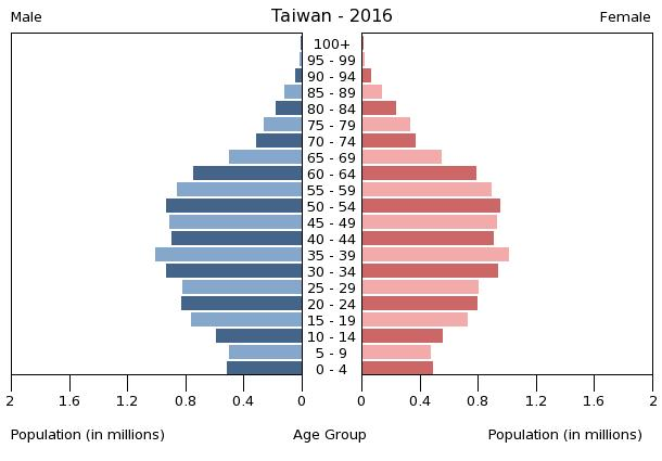 A population pyramid illustrates the age and sex structure of a country's population and may provide insights about political and social stability, as well as economic development. The population is distributed along the horizontal axis, with males shown on the left and females on the right. The male and female populations are broken down into 5-year age groups represented as horizontal bars along the vertical axis, with the youngest age groups at the bottom and the oldest at the top. The shape of the population pyramid gradually evolves over time based on fertility, mortality, and international migration trends.